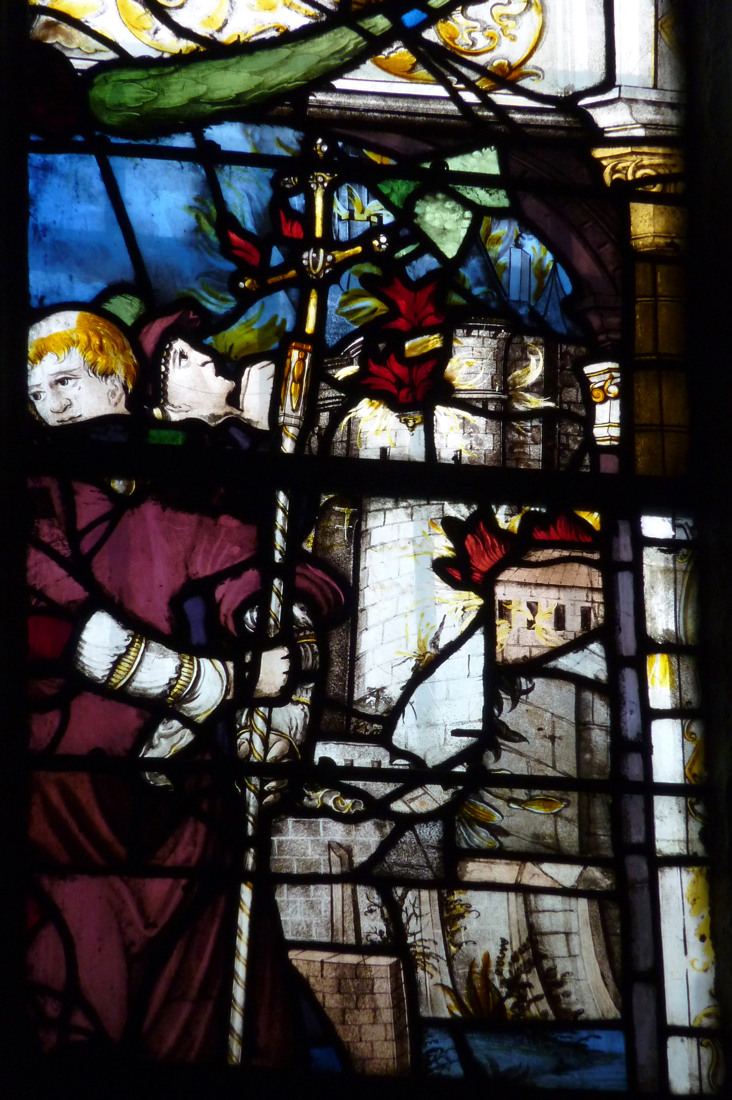 Katholische Pfarrkirche Saint-Aspais in Melun im Département Seine-et-Marne in der Region Île-de-France (Frankreich), Bleiglasfenster aus dem 16. Jahrhundert, Darstellung: Szenen aus dem Leben des hl. Lupus von Sens (Saint-Loup)